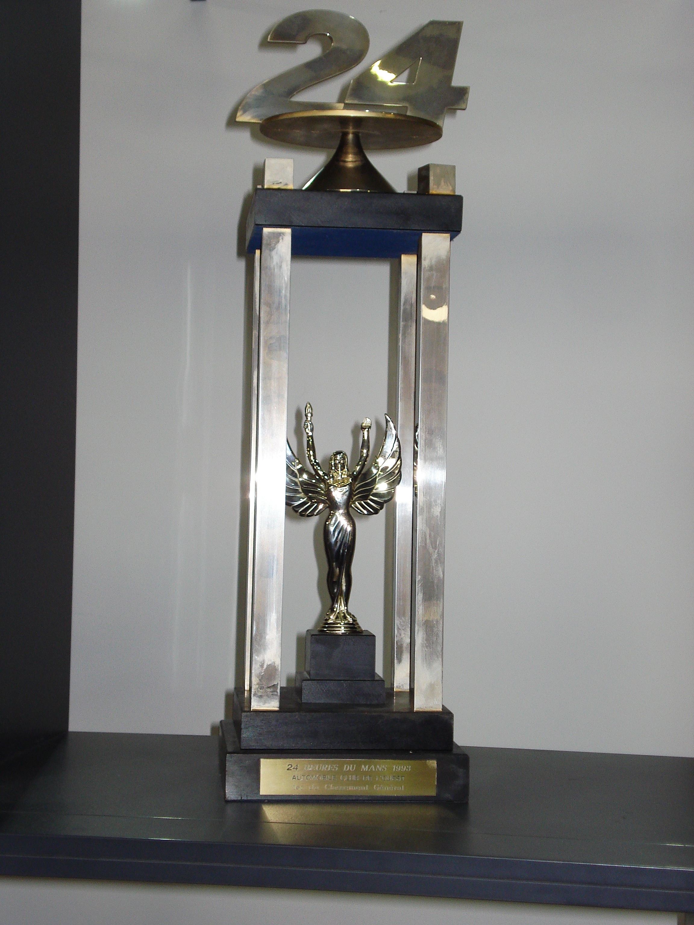 Le trophée des 24 Heures du Mans 1993 remporté par la Peugeot 905